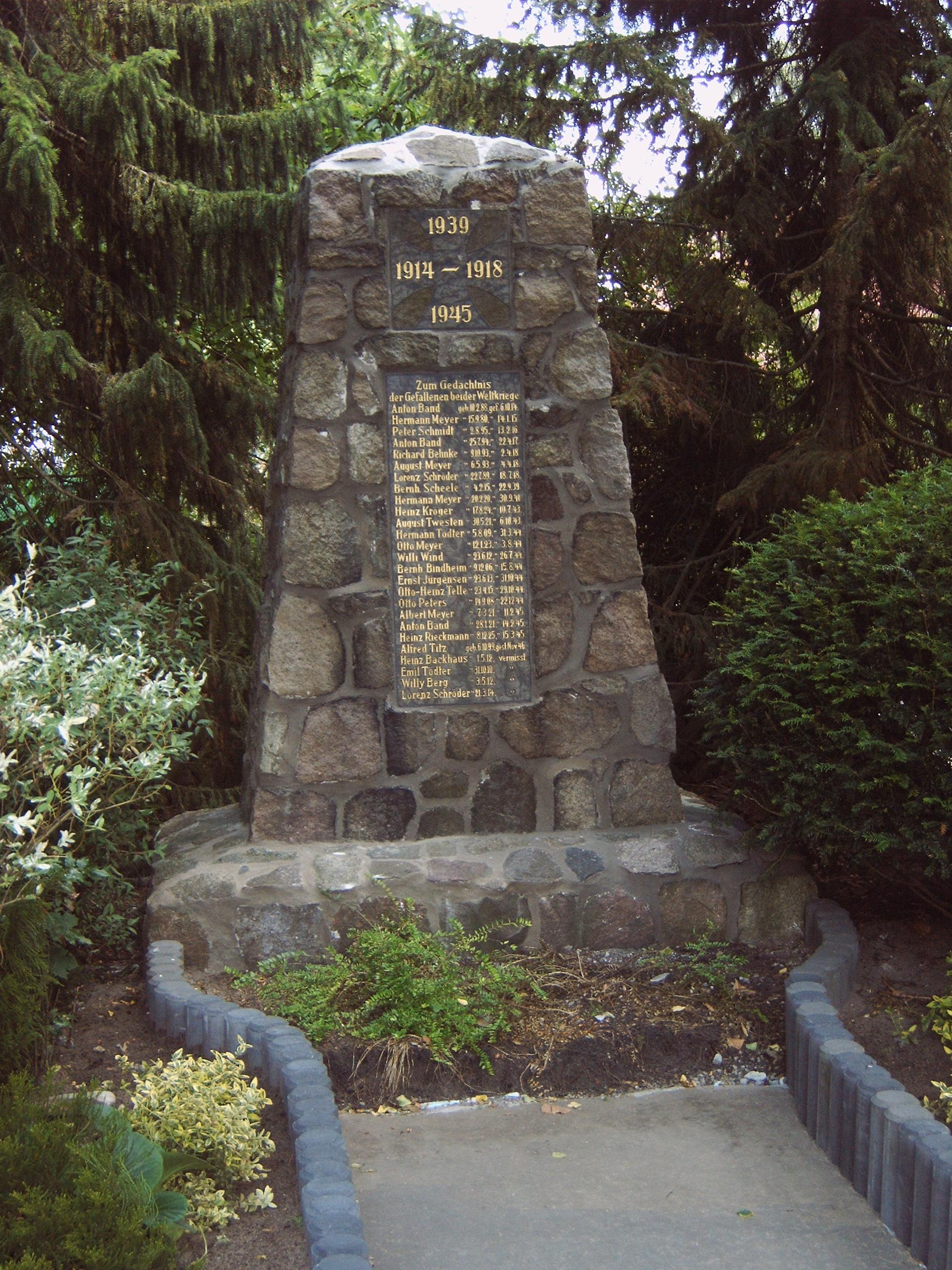 Kriegerdenkmaal in Sangenstää